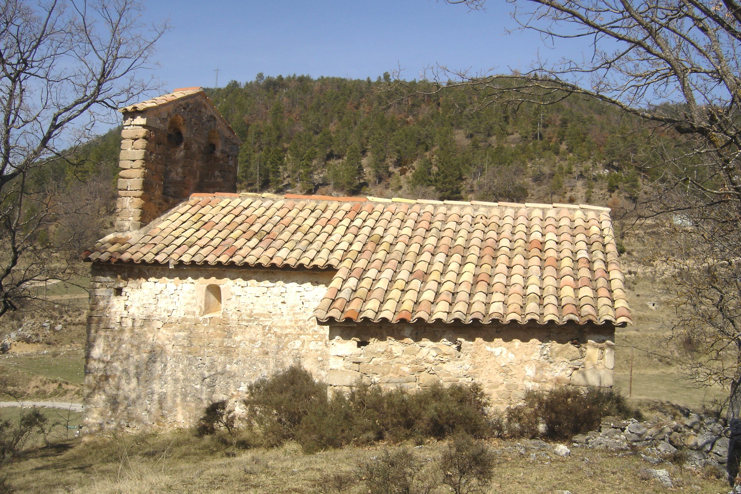 Façana meridional de l'ermita de Sant Lleïr de Casabella, al municipi de La Coma i la Pedra, a la Vall de Lord (Solsonès).